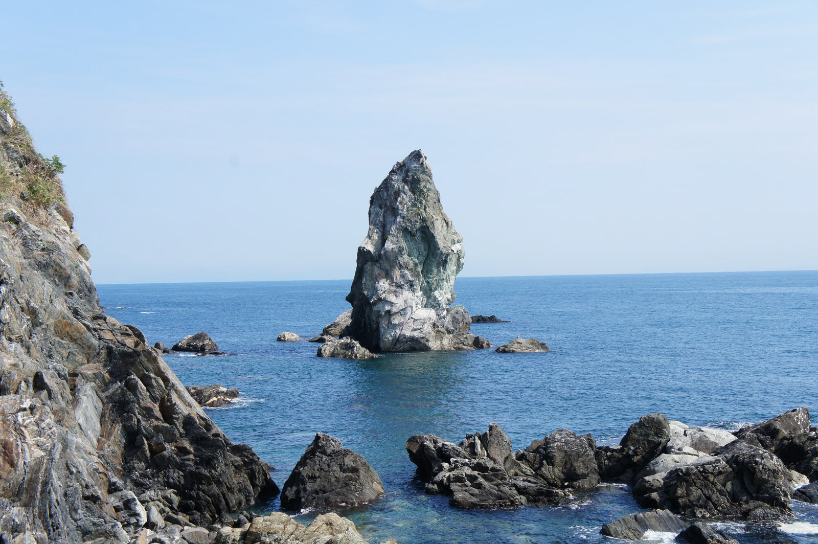 上立神岩。淡路島南岸の沼島にて。